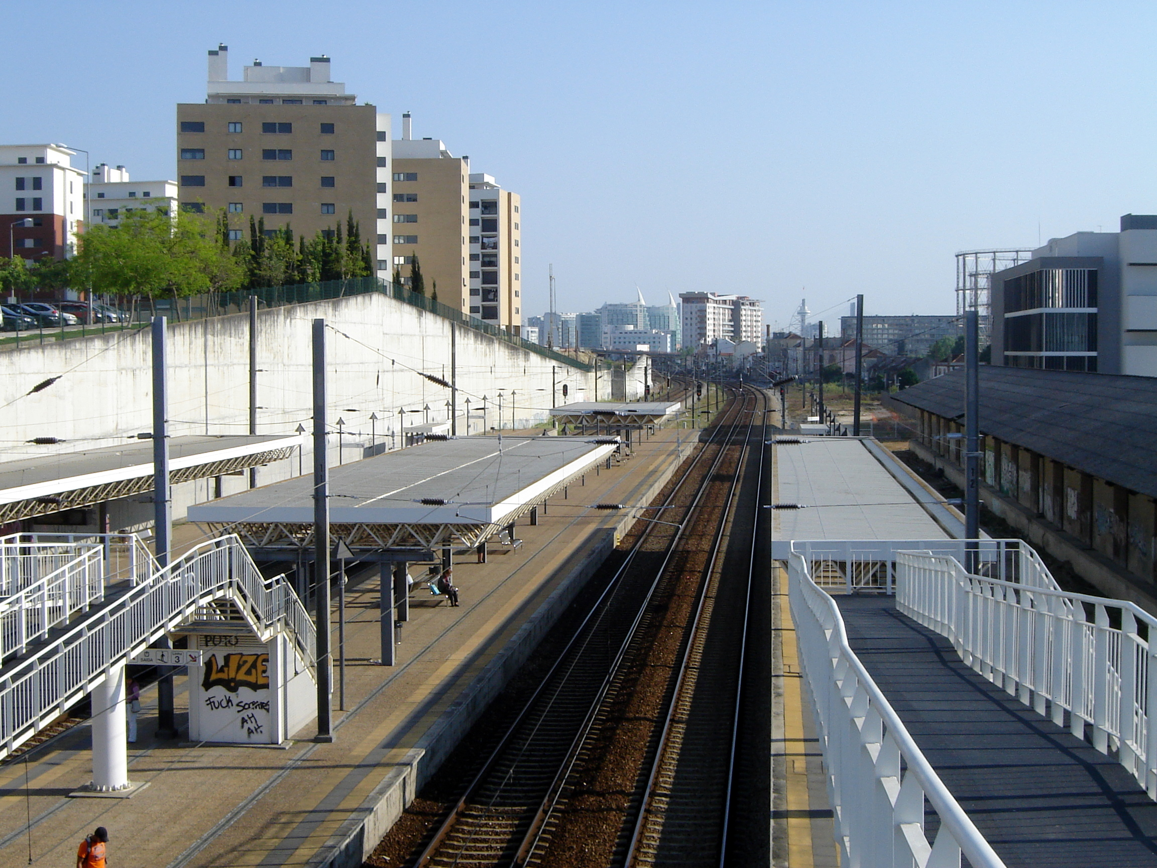 Vista da passagem para peões para a estação ferroviária de Braço de Prata